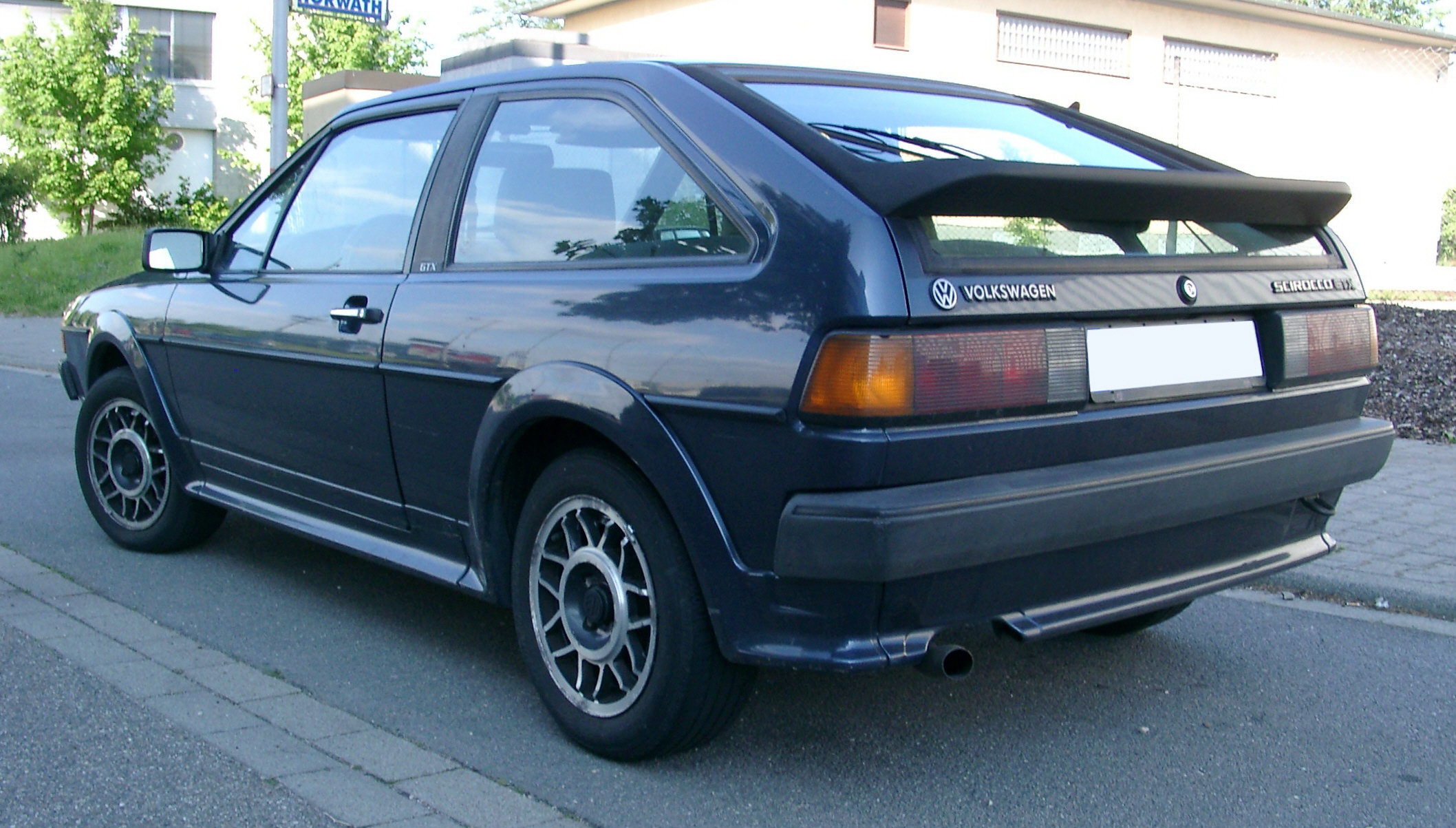 Volkswagen Scirocco, 2. Generation